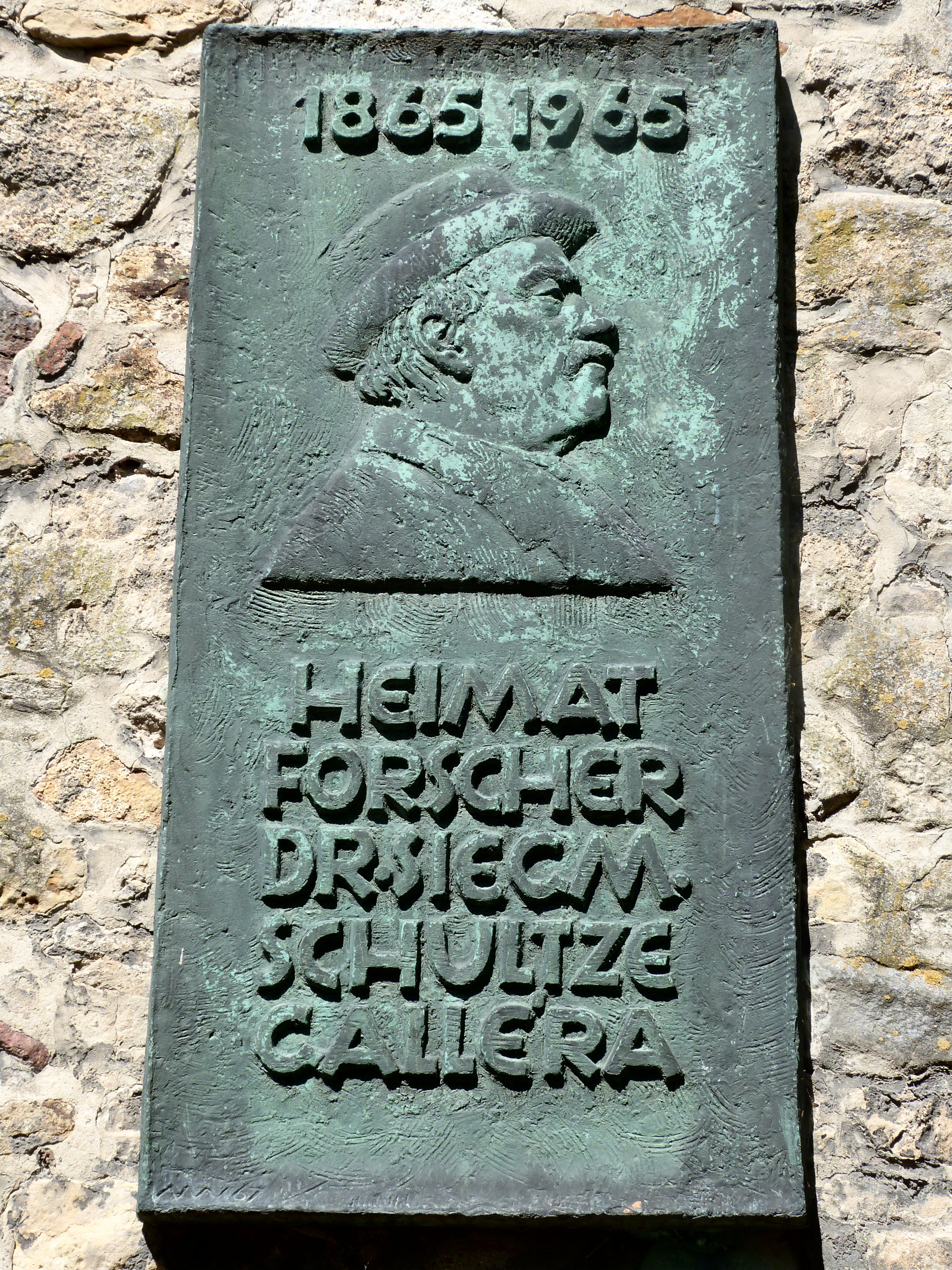 Gedenktafel für Siegmar Baron von Schultze-Galléra in der Kirchenruine Halle-Granau, Bldhauer: Martin Wetzel 1965